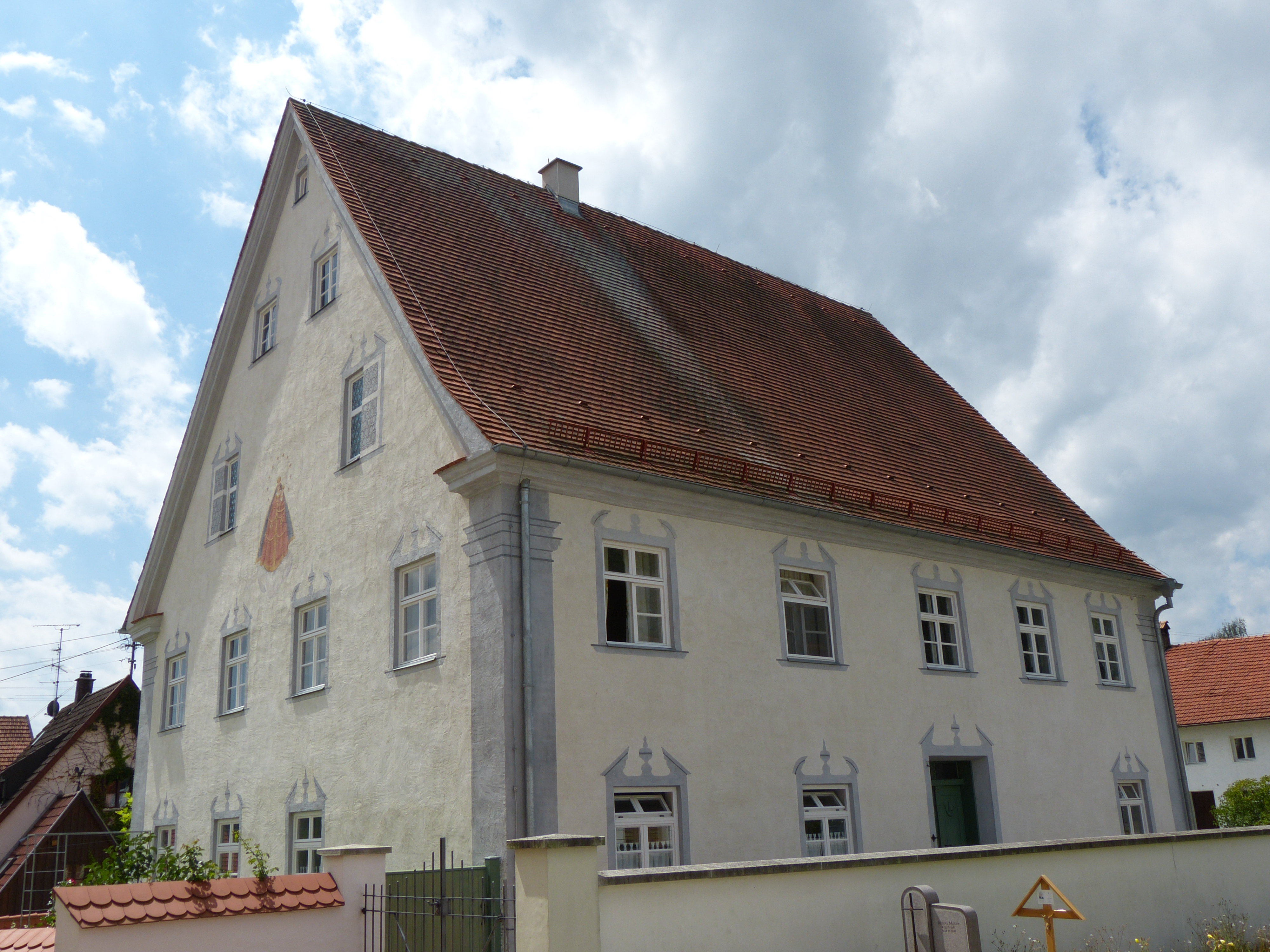 Pfarrhaus in Oberaurbach, Landkreis Unterallgäu, BayernThis is a photograph of an architectural monument.